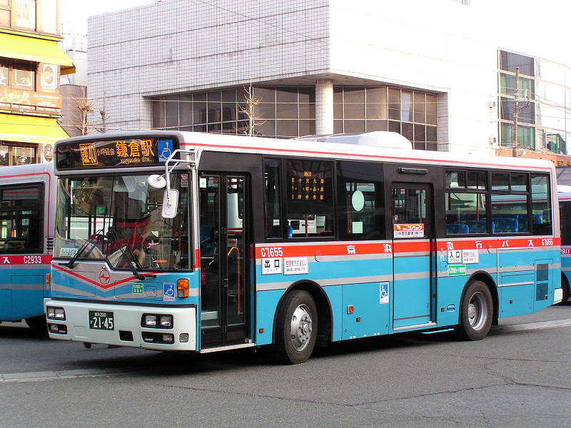 日産ディーゼル・スペースランナーRP PK-RP360GAN 京浜急行バス鎌倉営業所 C7655Nissan Diesel RP/Keihin Kyuko Bus in Kamakura, Japan